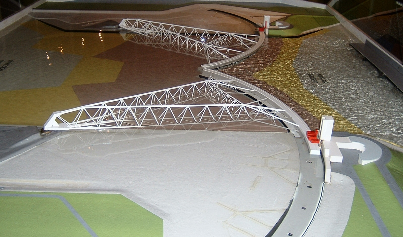 Schaalmodel van de Maeslantkering in het Keringshuis